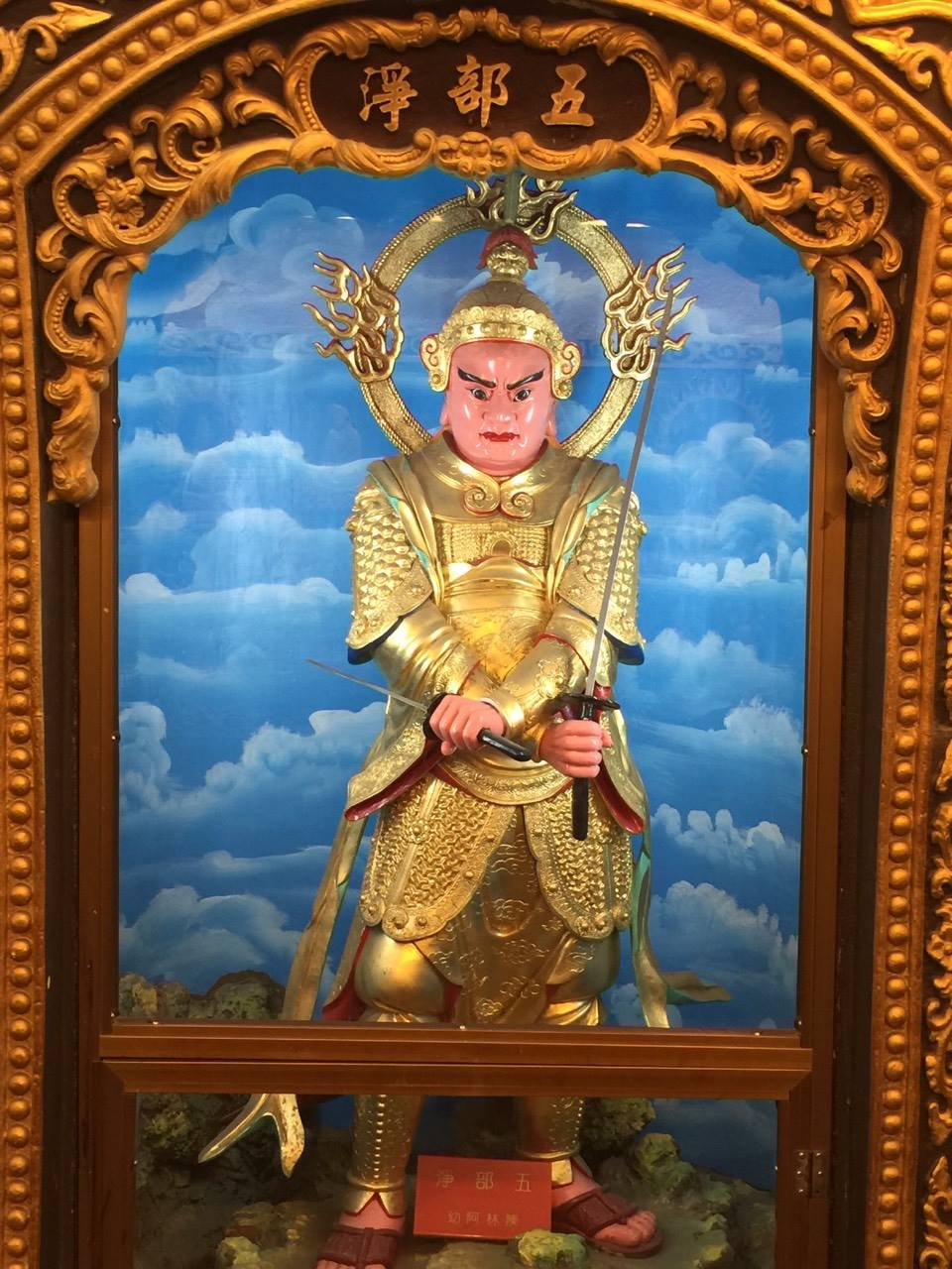 中文（台灣）: 關渡宮古佛洞五部淨王